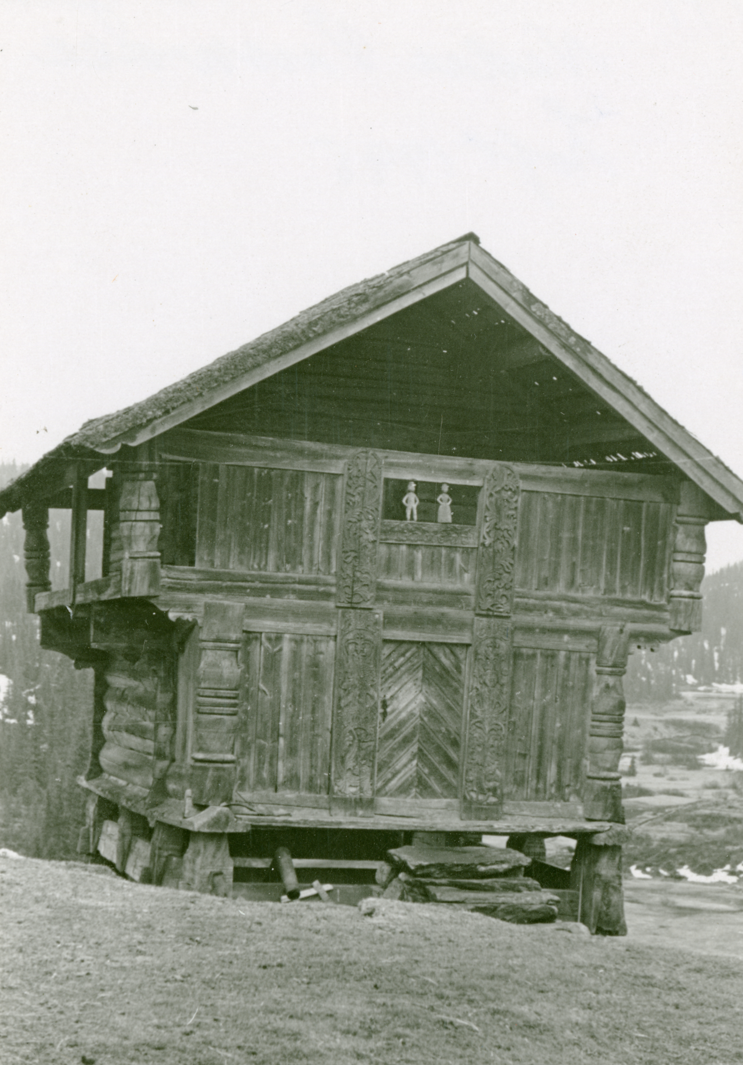 Vinsvoll-loftet, Akershus Ståvihøgda